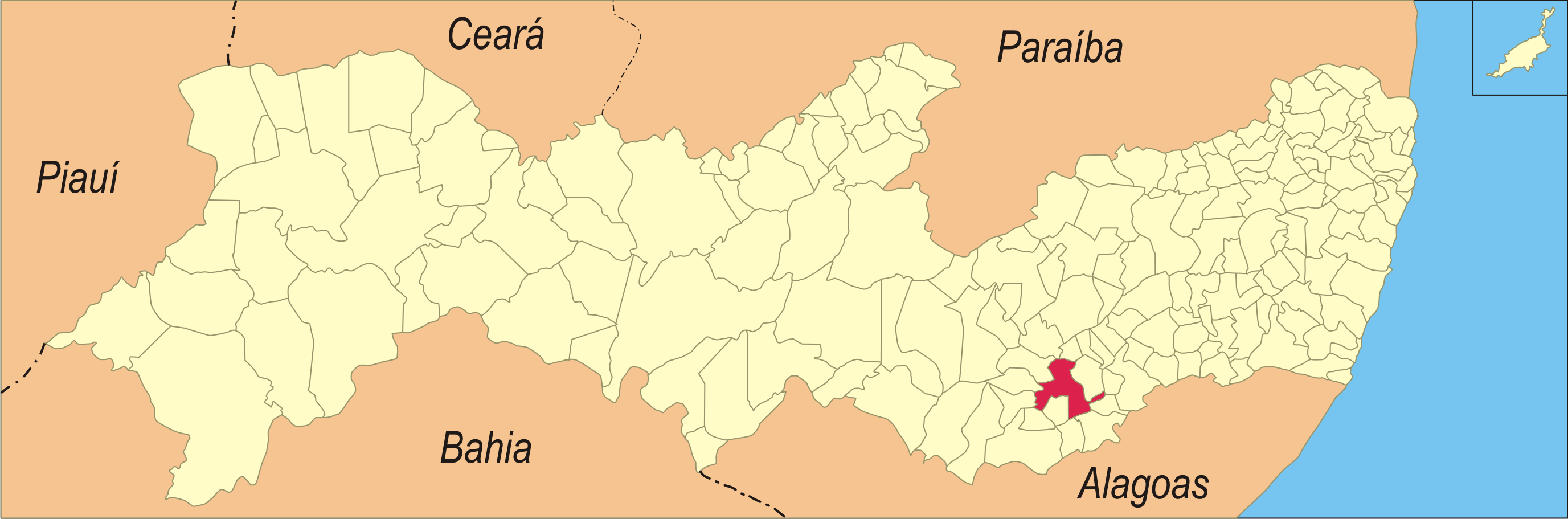 Localização da cidade em Pernambuco